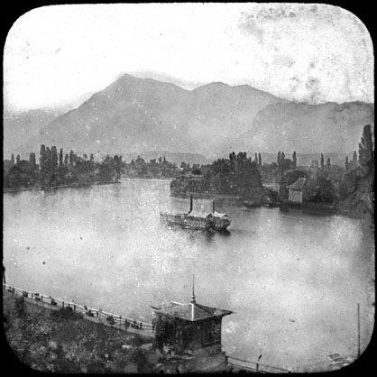 Fonds Trutat - Photographie ancienne Cote : TRU C 3310 Localisation : Fonds ancien (S 30) Original non communicable Titre : Vue générale de la rivière Aar avec le sommet du Niesen en arrière-plan (Suisse) Auteur : Trutat, Eugène Rôle de l’auteur : Photographe Lieu de création : Berne, Canton de (Suisse) Date de création : 1859-1910 [entre] Mesures : : 9 x 10 cm Observations : Note manuscrite de Trutat : " L'Aar et le Niesen ". Mot(s)-clé(s) : -- Montagne -- Sommet (montagne) -- Vallée -- Rivière -- Rive -- Arbre -- Bateau -- Berne, Canton de (Suisse) -- Suisse -- Aar (Suisse ; rivière) -- Niesen (Suisse) -- Alpes (Suisse) -- 19e siècle, 2e moitié -- 20e siècle, 1e quart -- Epoque Renaissance Médium : Photographies -- Positifs sur plaque de verre -- Noir et blanc -- Paysages de montagne -- Détourage au papier collé Bibliothèque de Toulouse. Domaine public